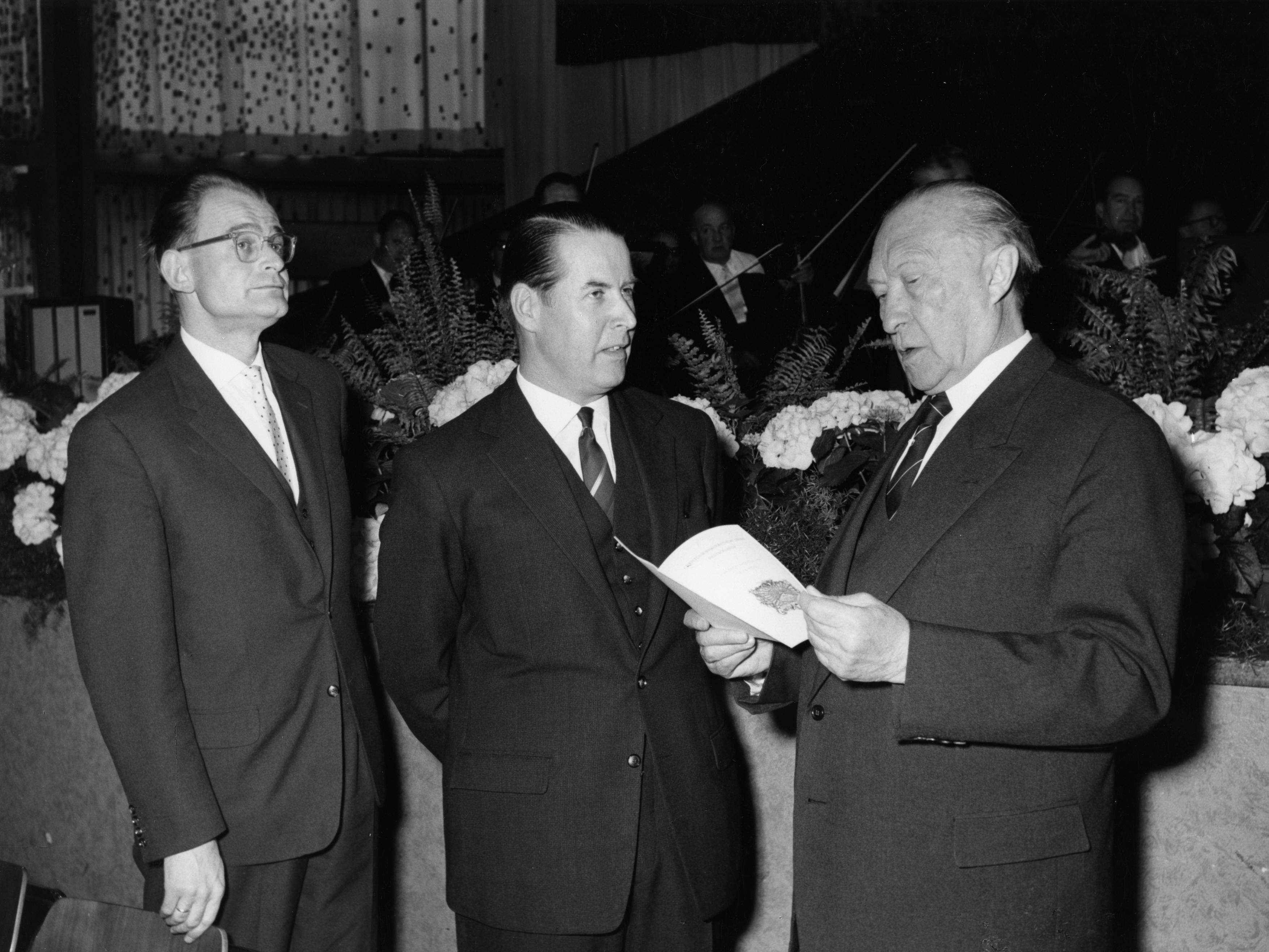 Adenauer, Konrad9. CDU-Bundesparteitag, 26.04.1960 - 29.04.1960